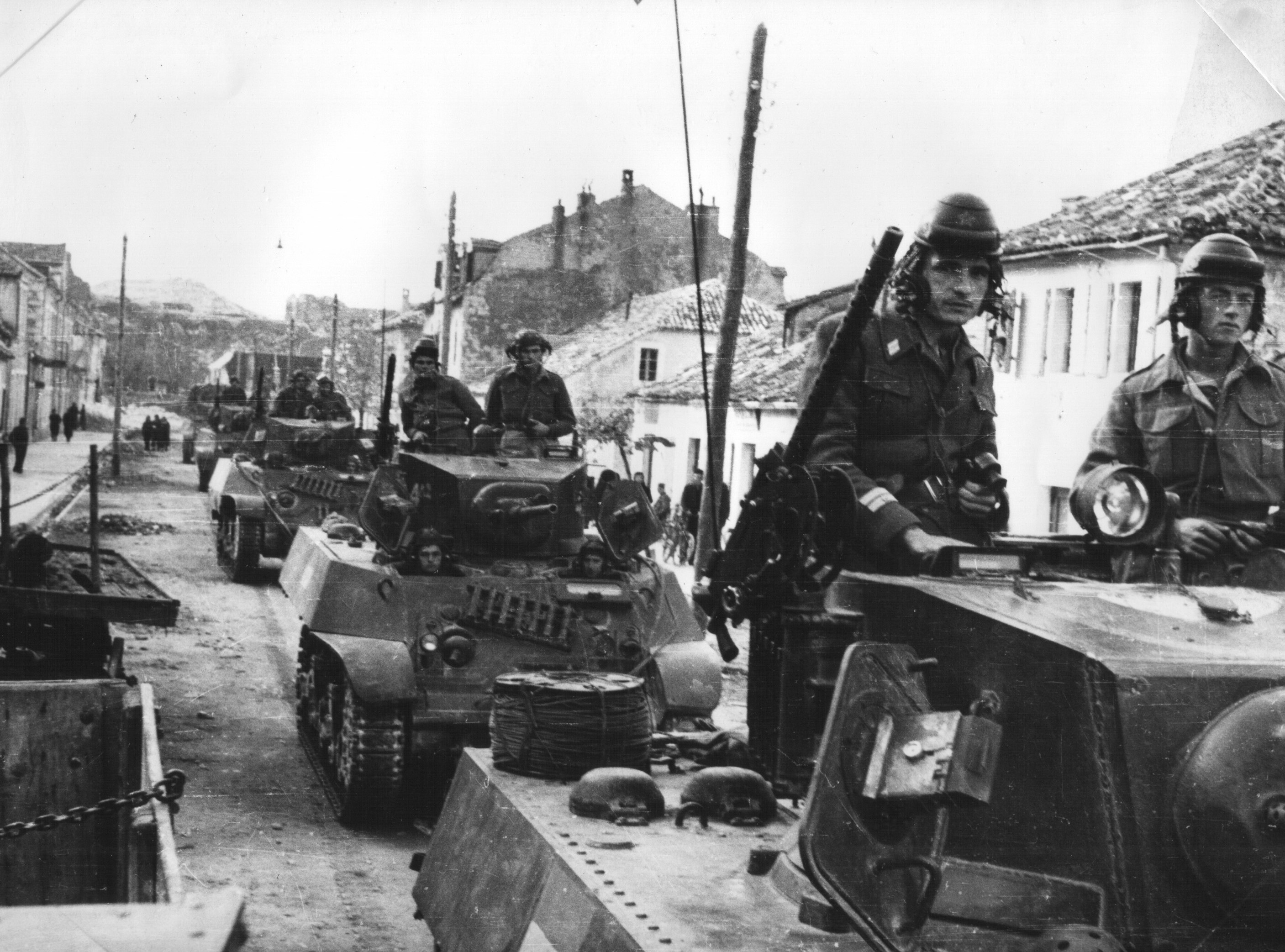 Srpski (latinica): Tenkovi drugog udarnog korpusa NOVJ u oslobođenom Nikšiću 1944